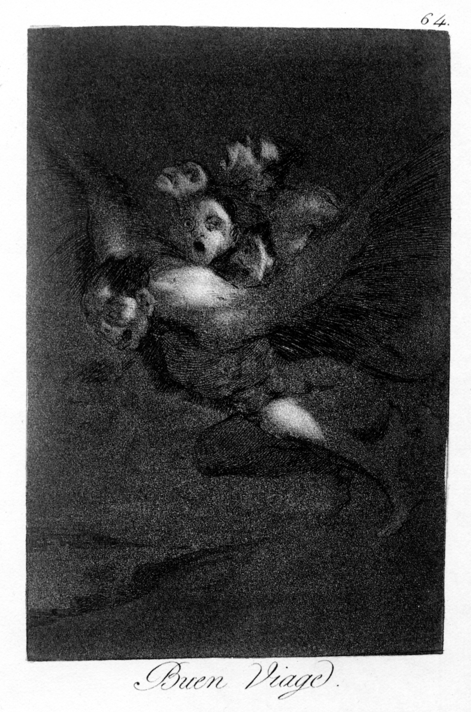 Capricho nº 64: Buen viaje de Goya, serie Los Caprichos